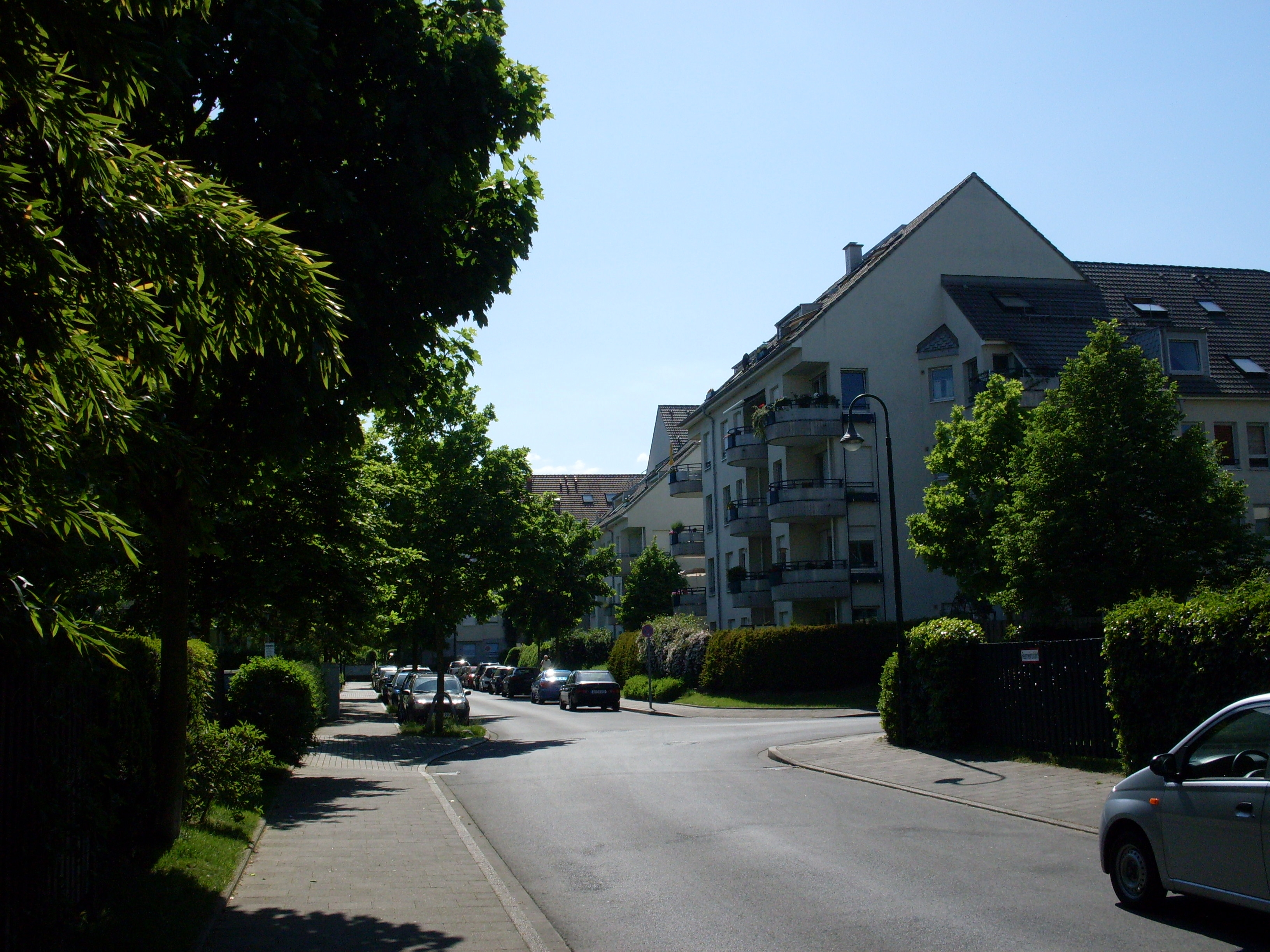 Düsseldorf-Ludenberg Siedlung an der Kaiserburg